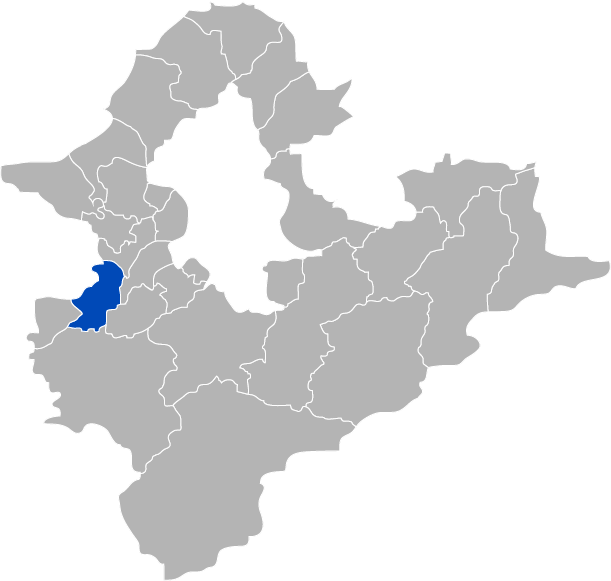 KaurJmeb為編輯臺灣省臺北縣樹林市，於2005年2月8日所繪。